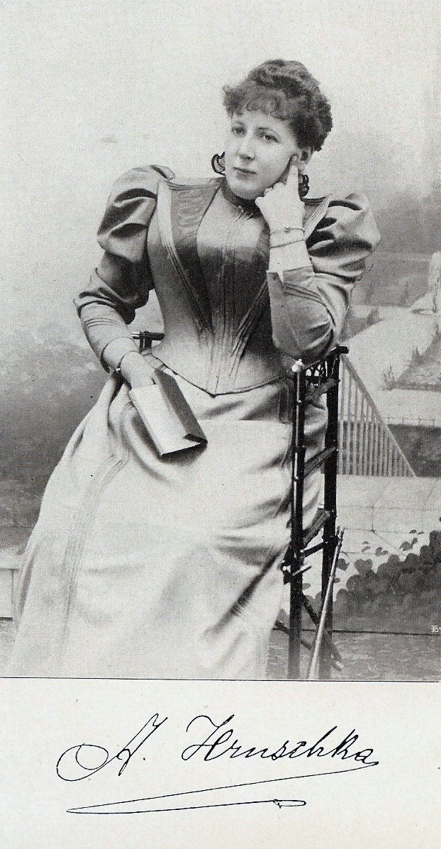 Das Foto wurde für mein Werk über Annie Hruschka verwendet. Das einzige bisher gefundene Bild der Autorin stammt aus einem ihrer Bücher von 1906 (Weltmenschen).